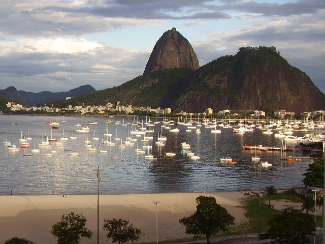 Praia de Botafogo-RJ